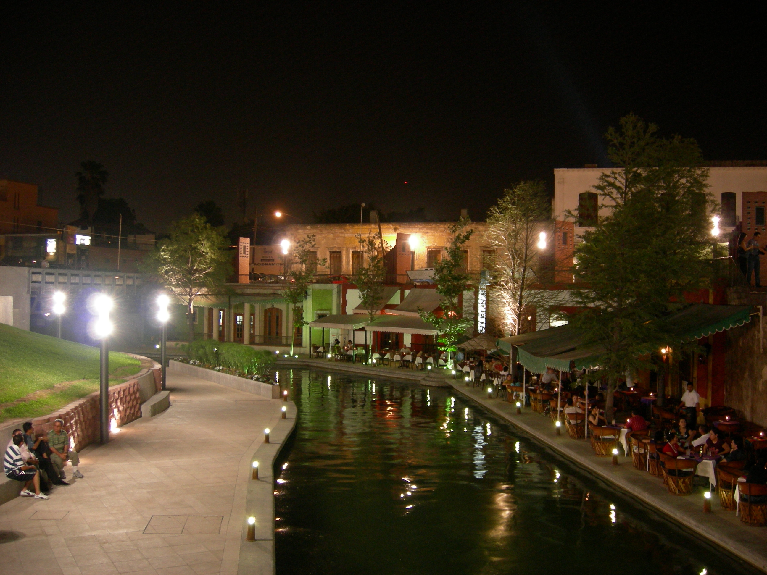 Paseo Santa Lucia